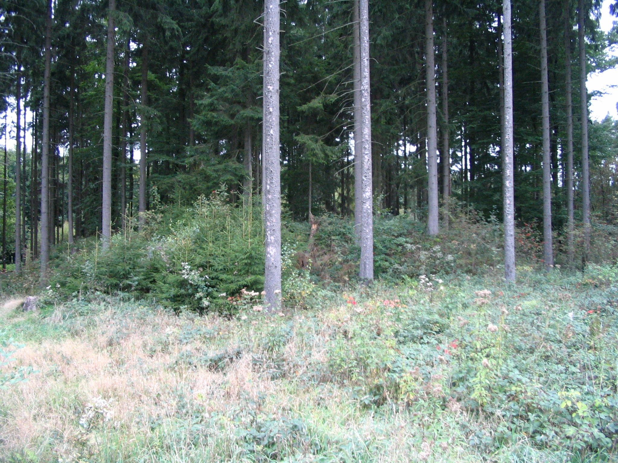 zugewachsene Abraumhalden des Bergwerks Ilse bei Bell/Hunsrück